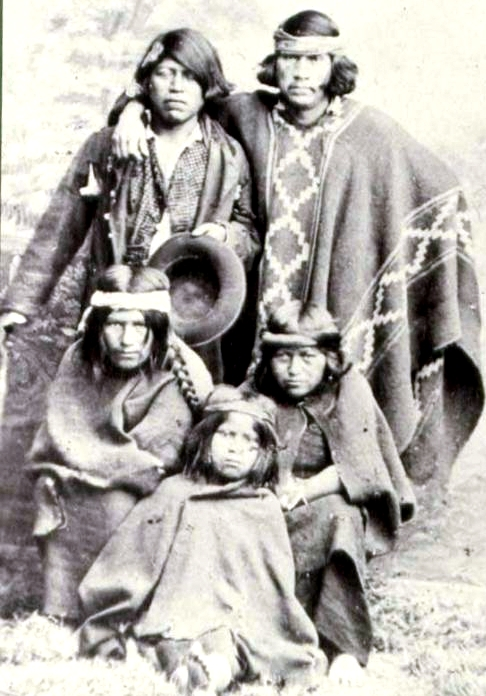 Familia Mauch en el Siglo XIX